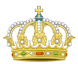 Corona moderna utilizzata dai re dei regni componenti formalmente l'area dell'ex Sacro Romano Impero e soggetti formalmente ad autorità imperiale anche dopo il 1806